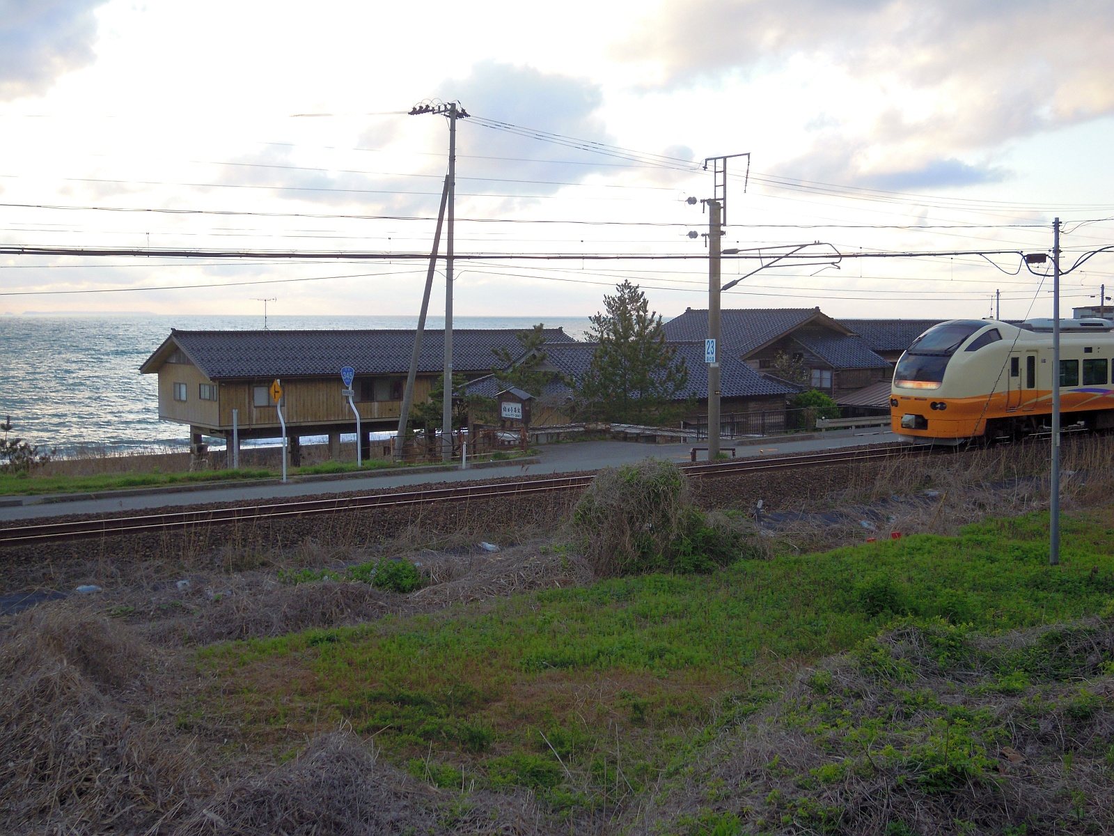 山形県飽海郡遊佐町にある湯ノ田温泉（酒田屋旅館）。左奥に見えるのは夕暮れの日本海と飛島。右側に見える列車は特急いなほ。